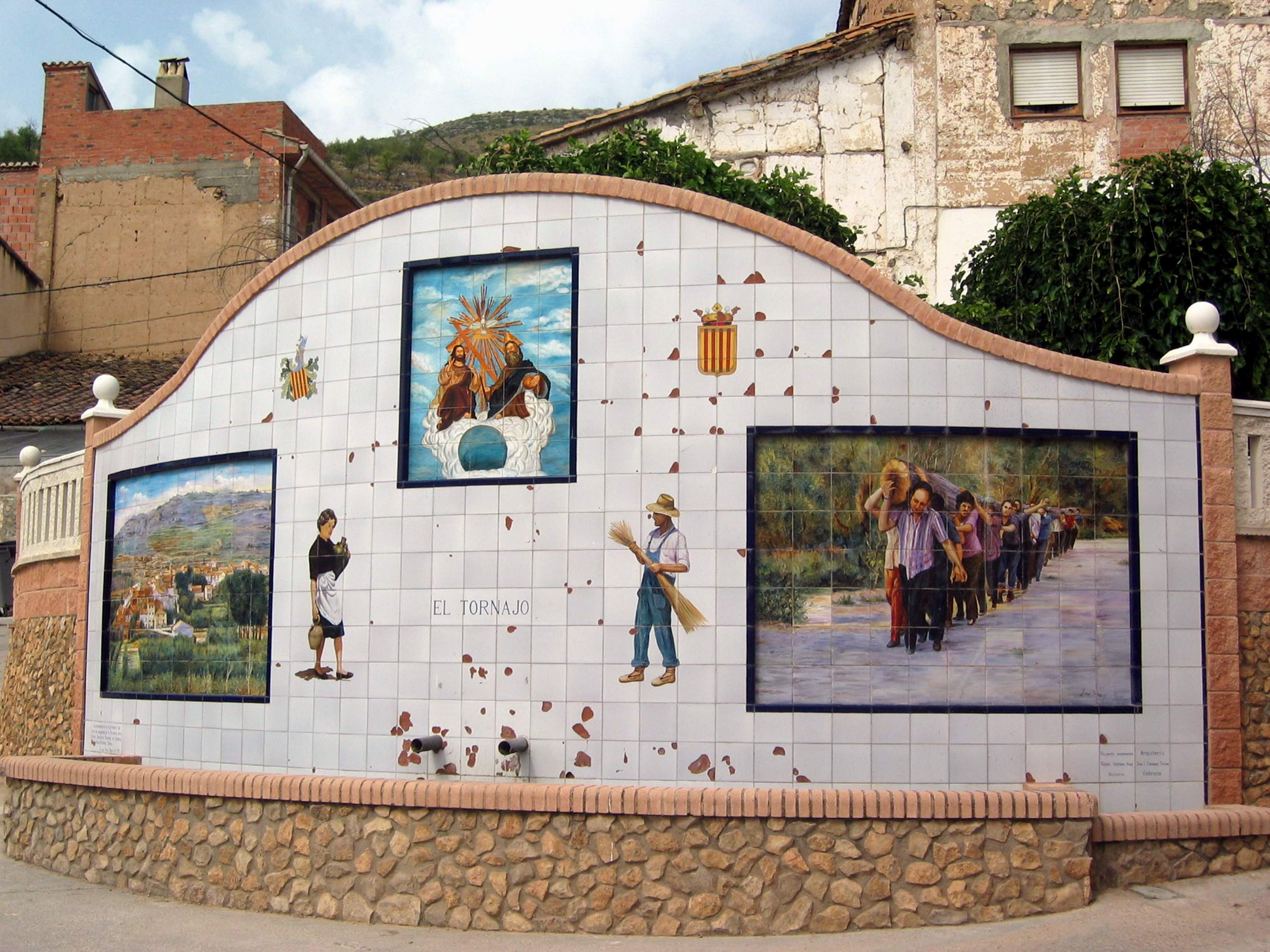 Vista parcial (frontal) de la Fuente del Tornajo en Casasaltas (Valencia), con detalle del frontis, plafones cerámicos y abrevadero (2003).